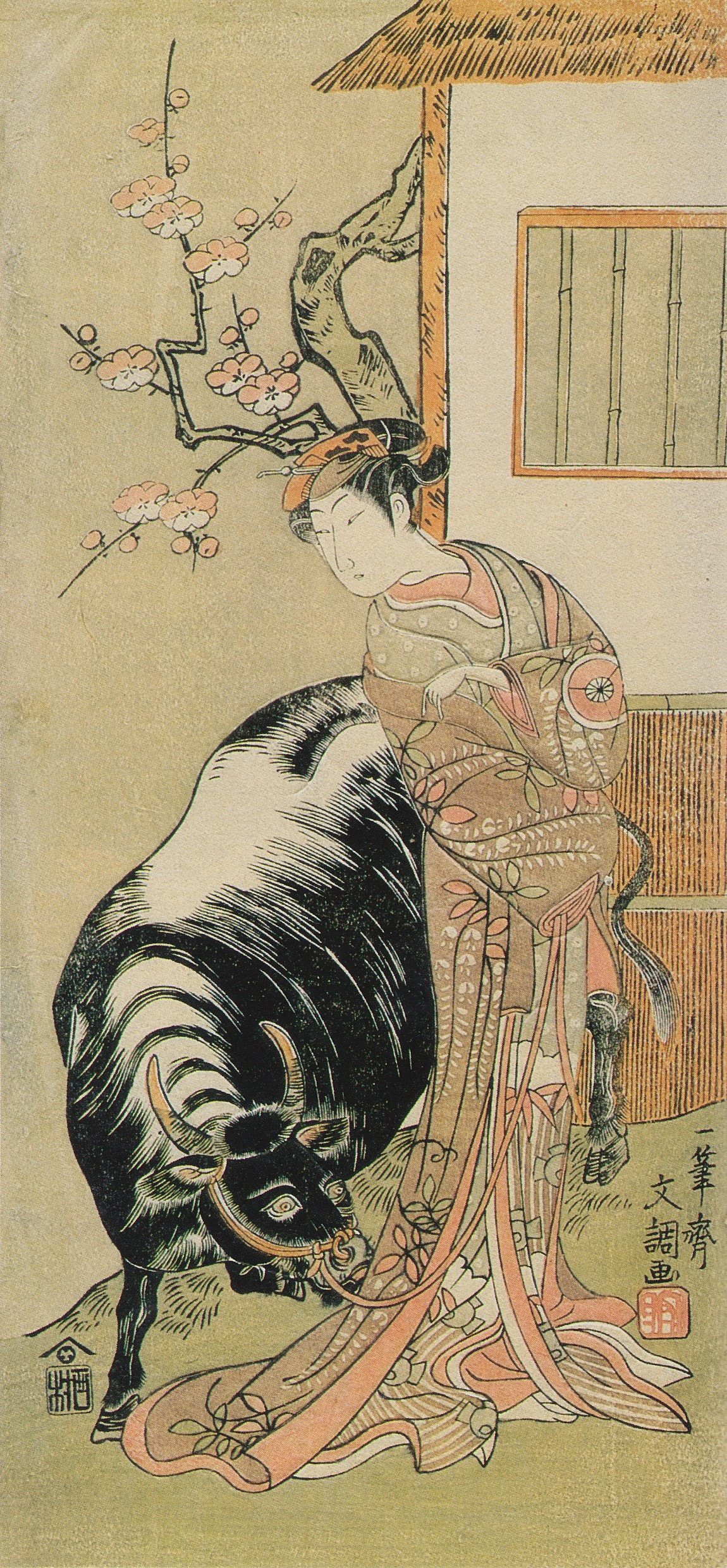 Iwamura Hanjiro IV